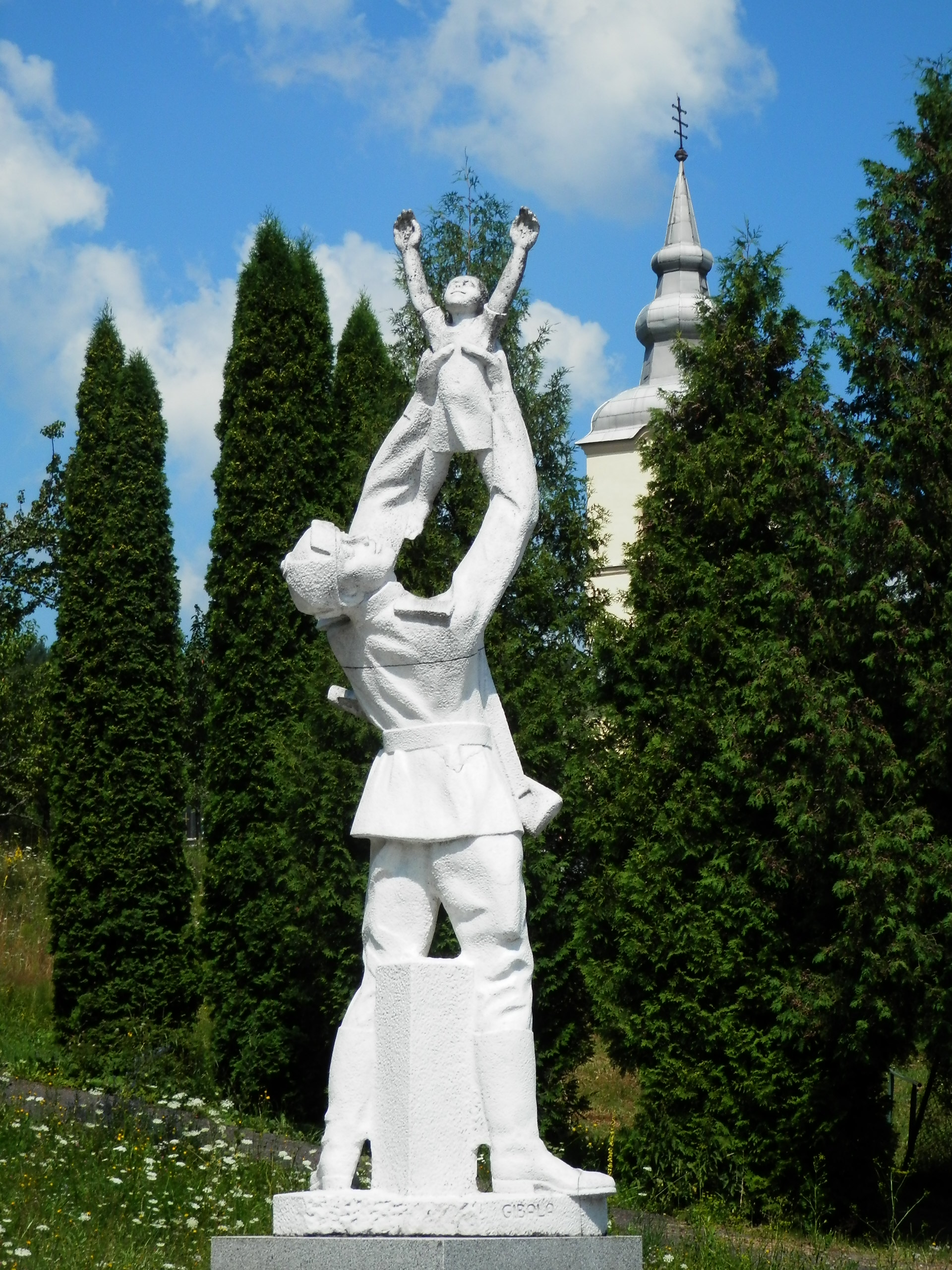 Pomník oslobodenia obce Kalinov. Okres Medzilaborce.